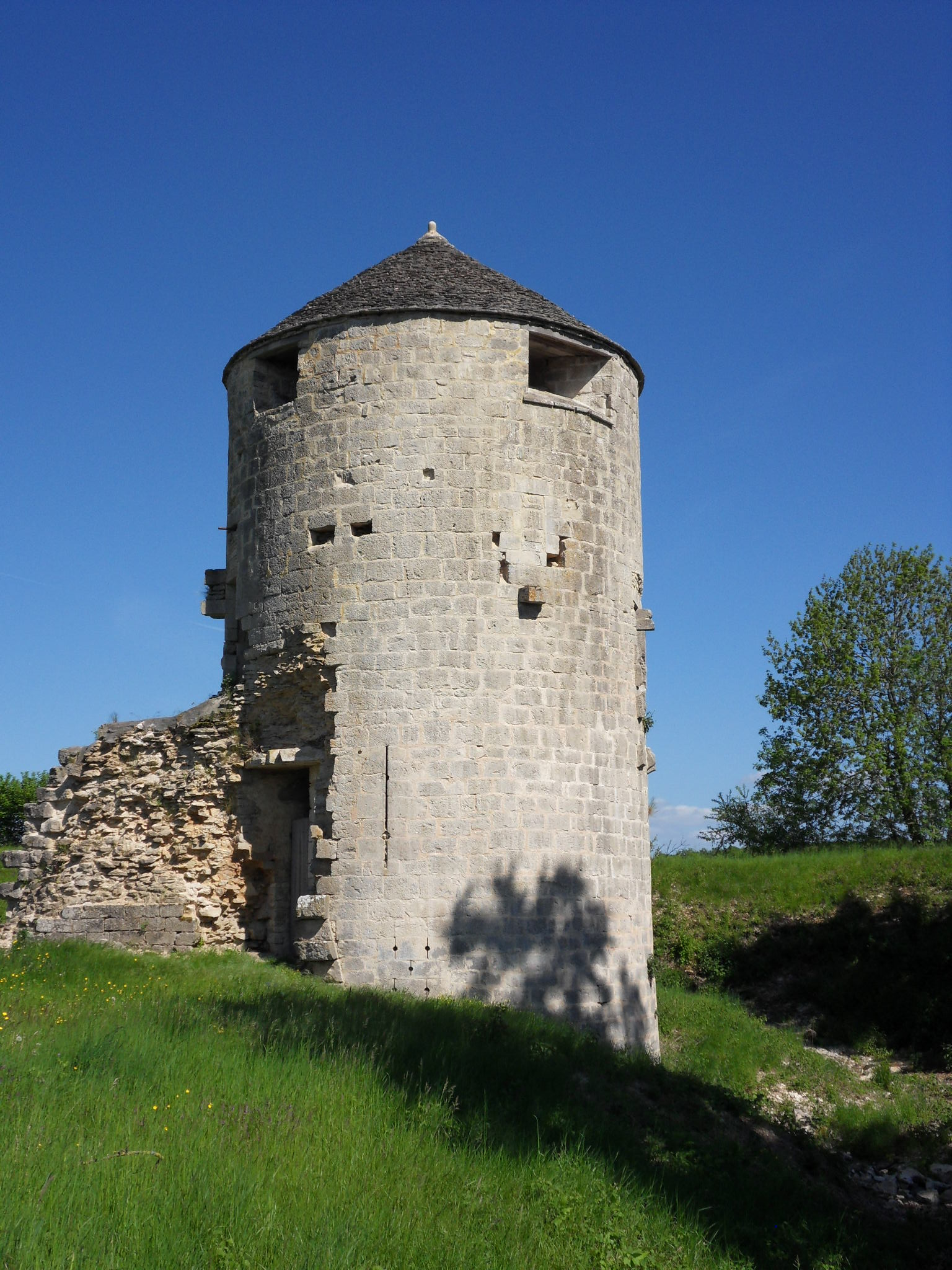 Château de Villaines-en-Duesmois, (XIIIe siècle, propriété de Robert de Tanlay, acquis en 1253 par le duc de Bourgogne Hugues IV de Bourgogne), Côte-d'Or, Bourgogne, FRANCE